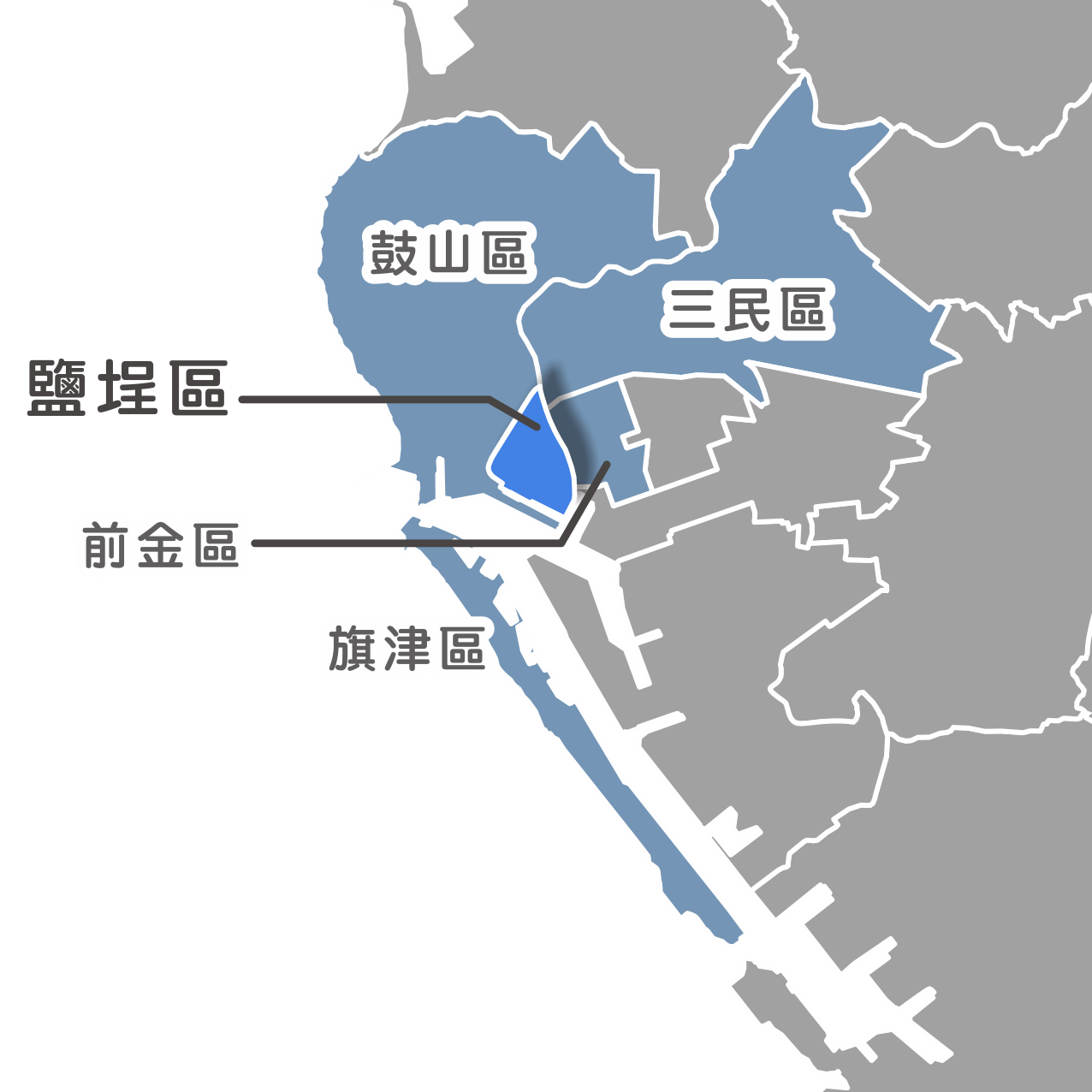 鹽埕區相對位置